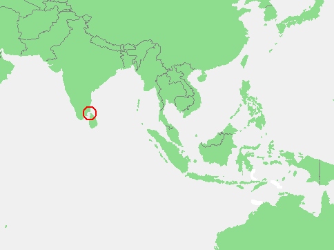 Mannar bay